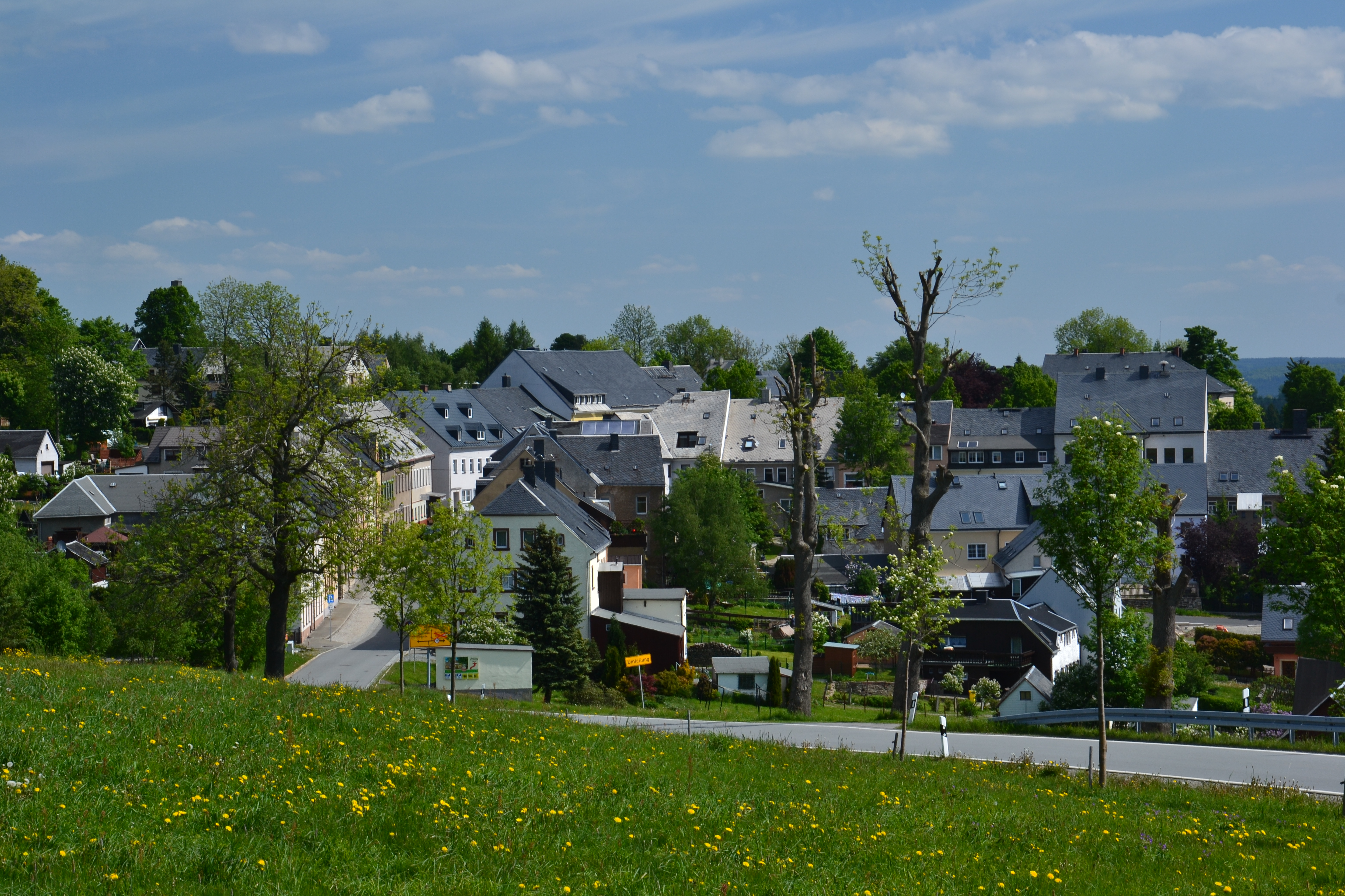 Jöhstadt – pohled z jihozápadu